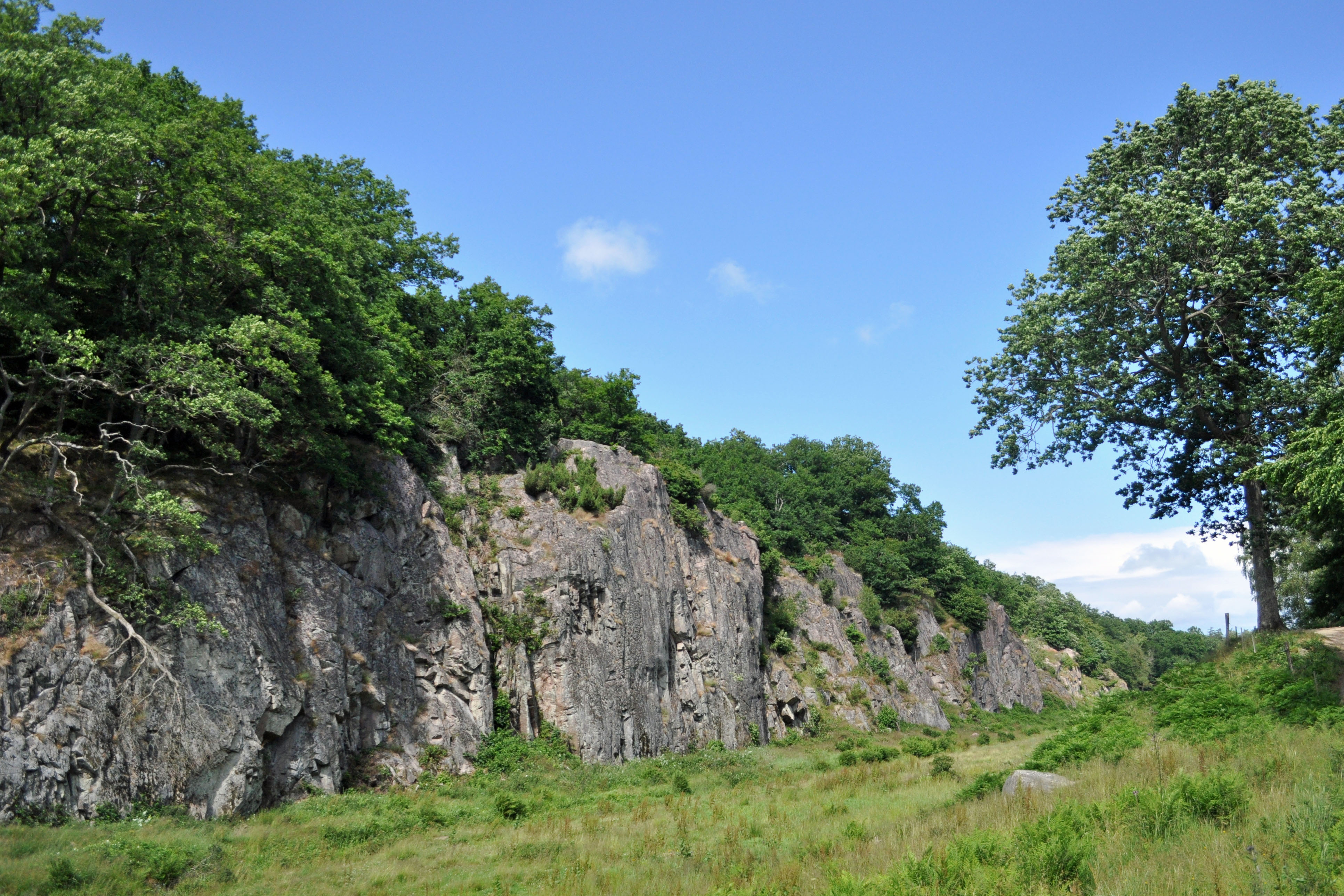 Ekkodalen, Bornholm (2012-07-10), by Klugschnacker in Wikipedia (11)